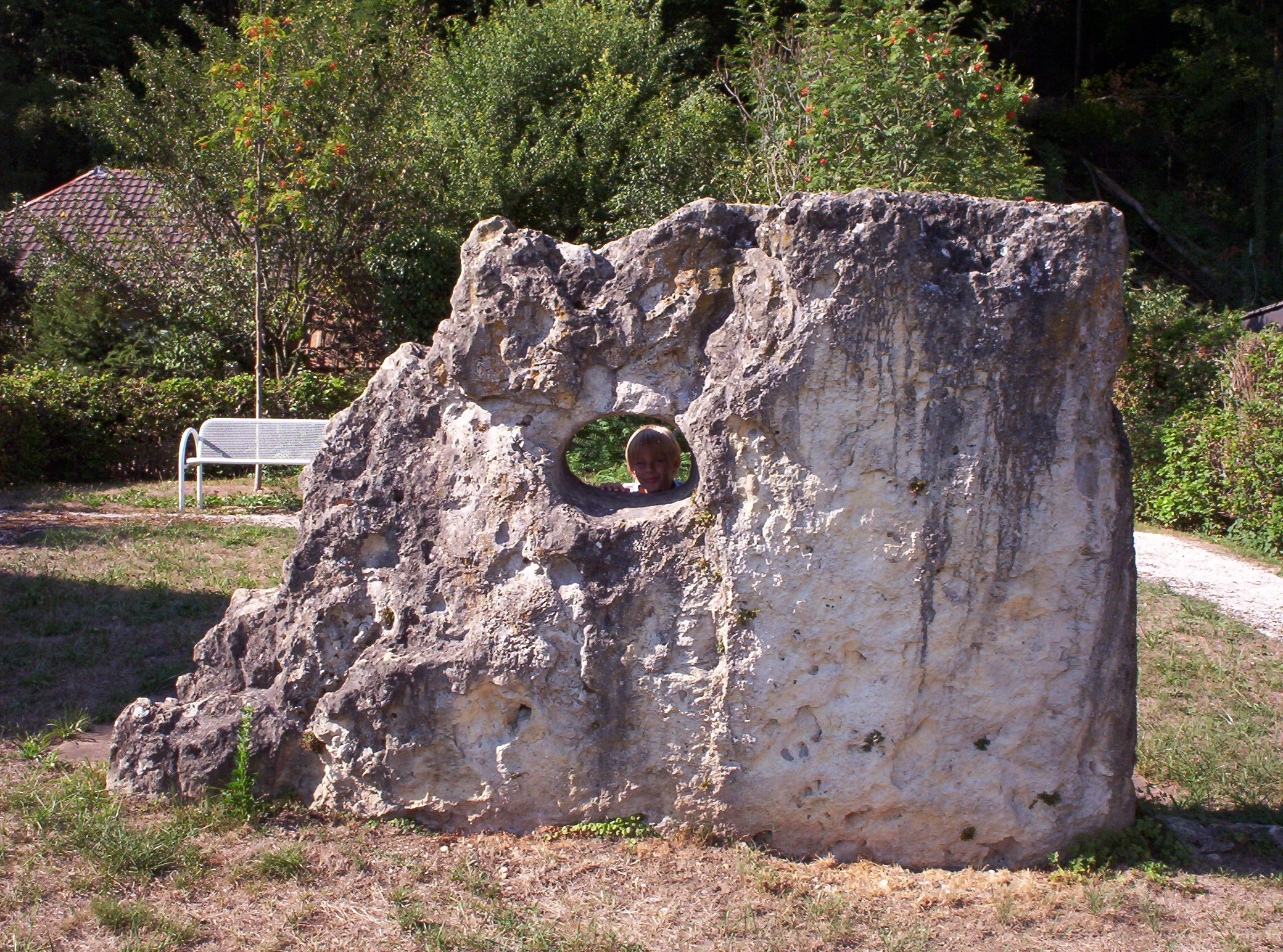 Eingangsstein des Megalithgrabes in Schwörstadt